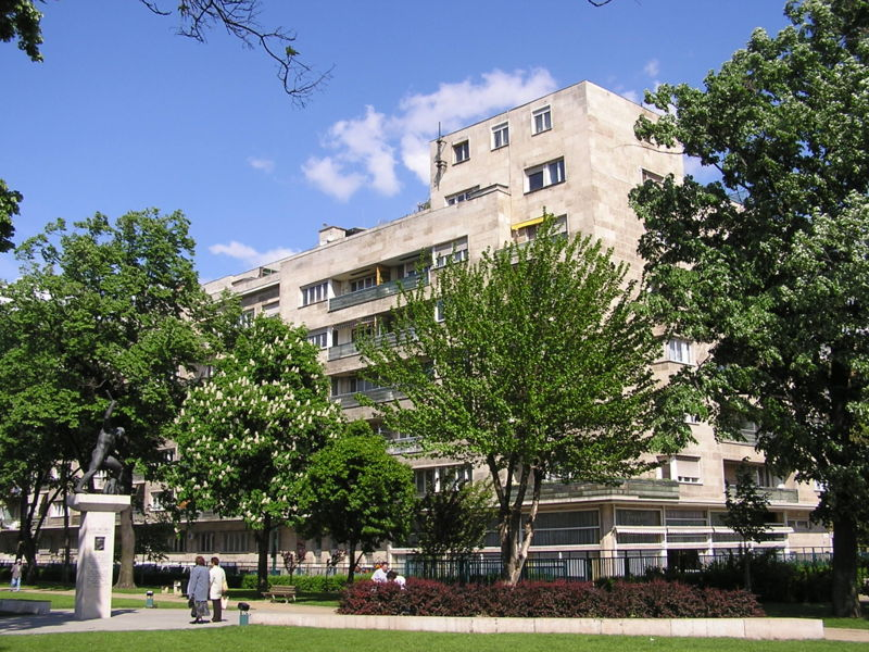 A Szent István park az újlipótvárosi Duna-parton, saját kép